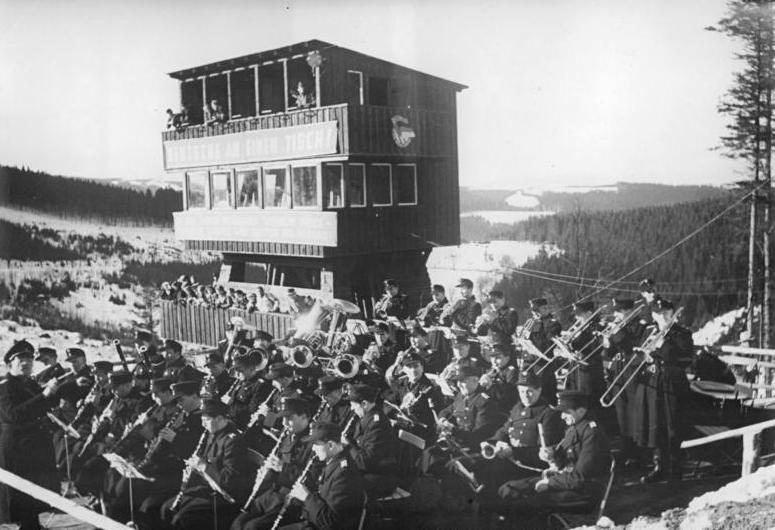 Illus Seidel 16.2.51 Die 2. Wintersportmeisterschaften der Deutschen Demokratischen Republik vom 11.-18.2.51 in Oberhof UBz: Das Orchester der Berliner Volkspolizei spielt an der "Thüringer Schanze" vor dem Kampfrichterturm.